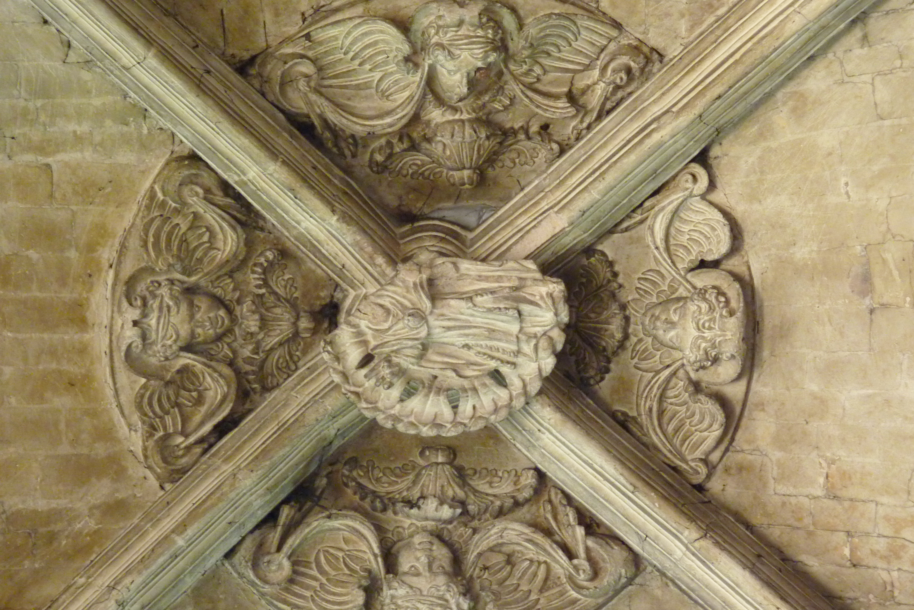 Kathedrale Saint-Maclou in Pontoise